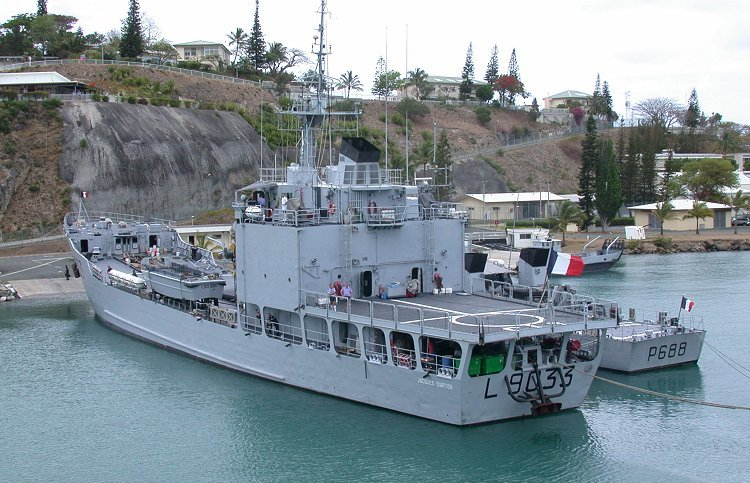 Le bâtiment de transport léger Jacques Cartier et le patrouilleur La Moqueuse, à leur poste d'amarrage de la base Chaleix de Nouméa. (Nouvelle-Calédonie - 7 novembre 2002).